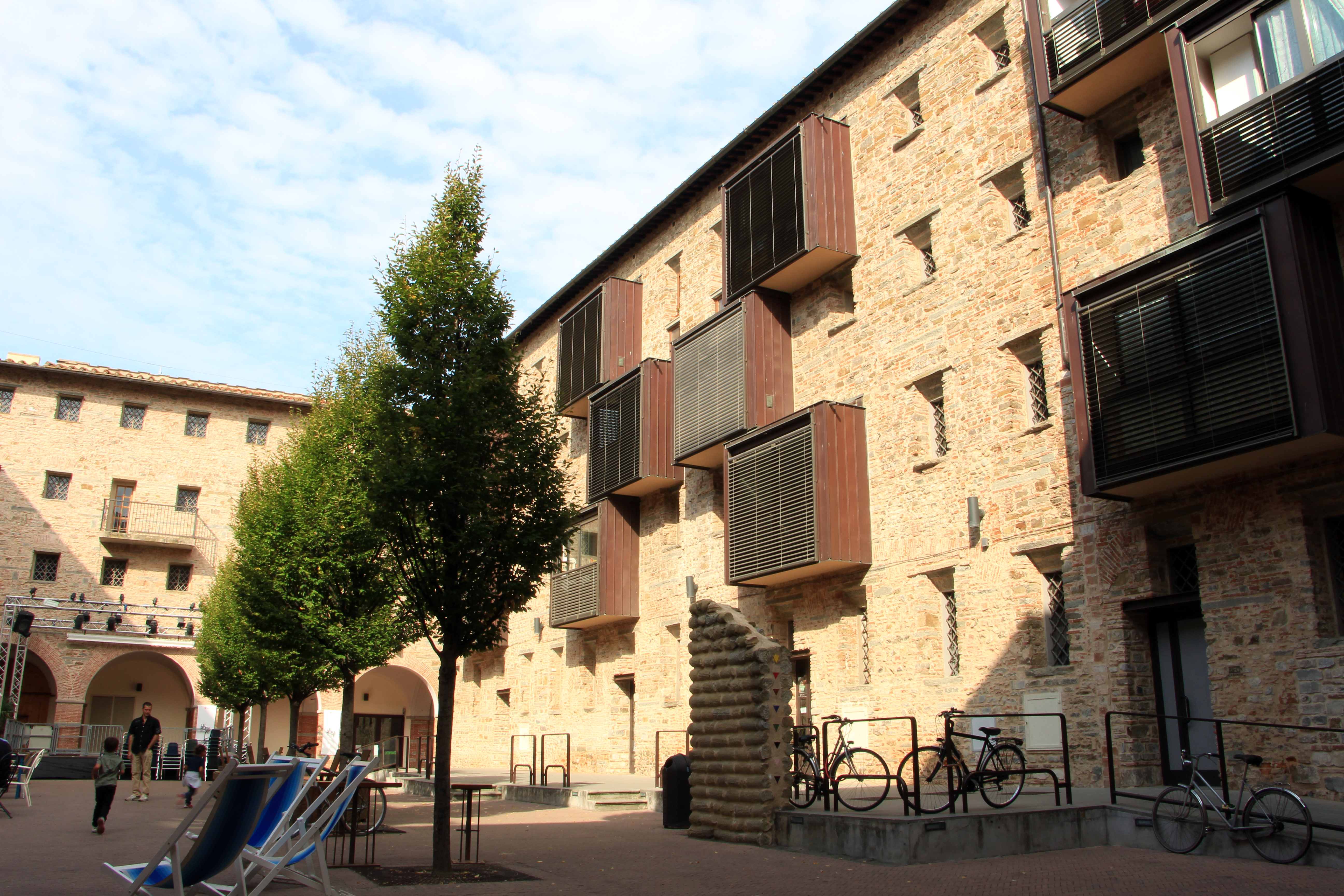 Firenze, miscellanea